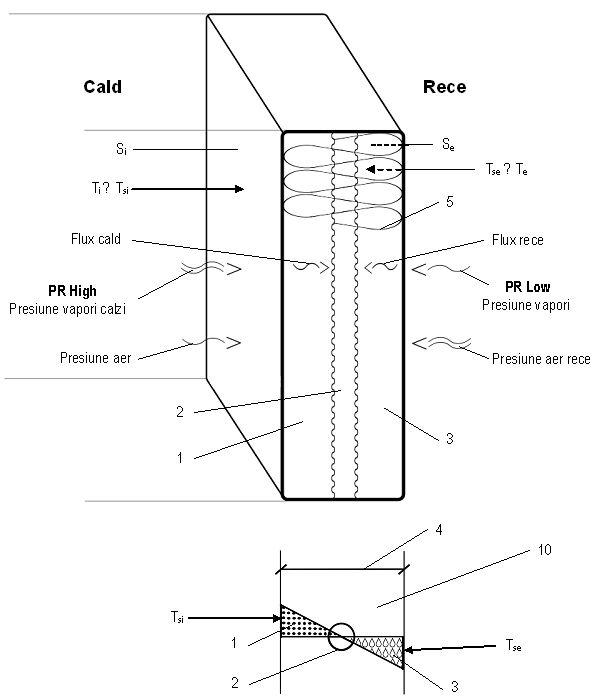 Izolaţie termică impermeabilă la vapori sau Ansamblu termoizolant nepermisiv, expus unor diferenţe de temperatură şi presiune ale vaporilor.